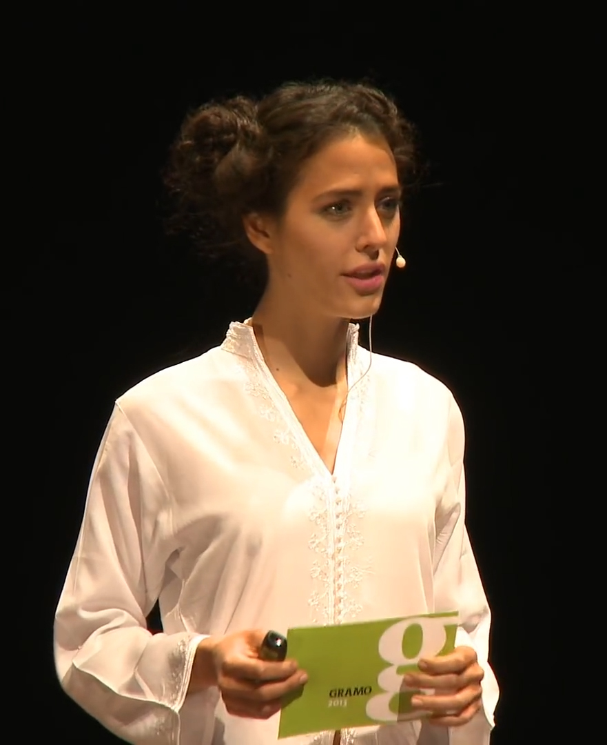 Fiorella Migliore